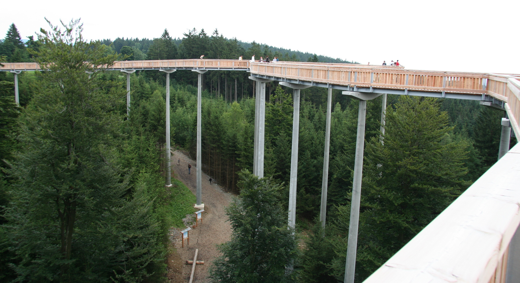 Waldwipfelweg in Maibrunn bei St. Englmar